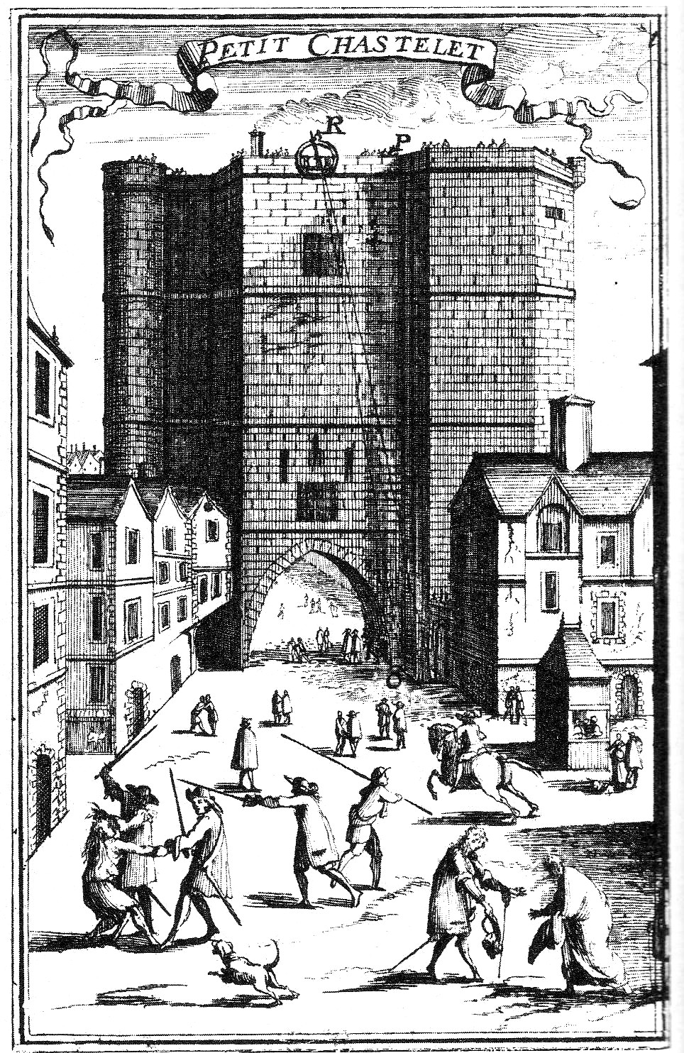 Le Petit Châtelet de Paris vers 1650